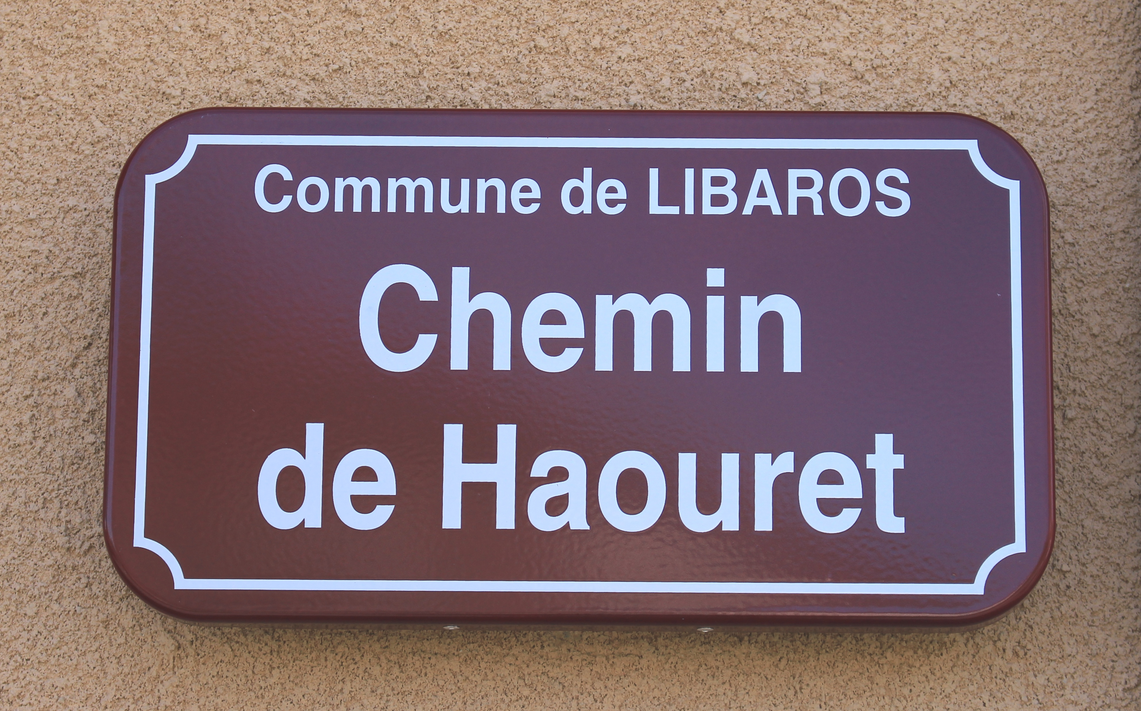 Rue du village de Libaros (Hautes-Pyrénées)